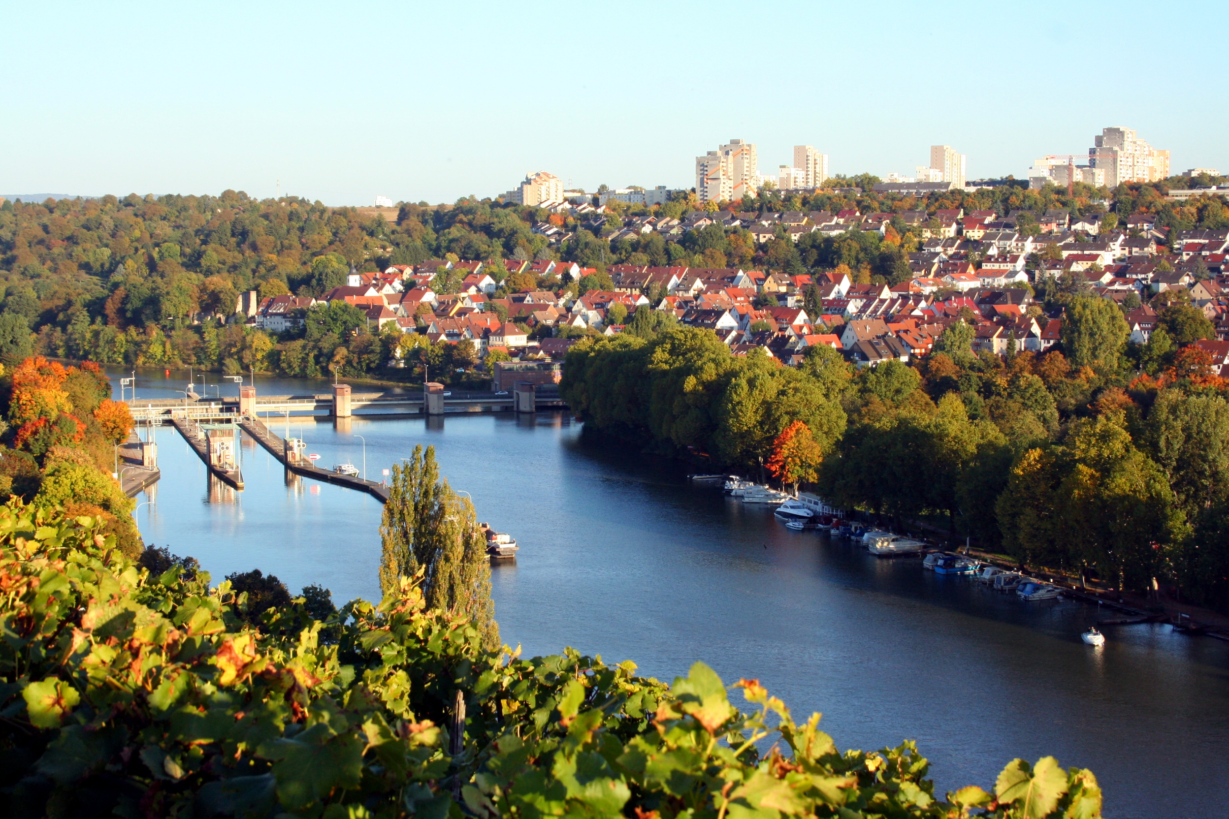 Stuttgart-Hofen; links die Neckarschleuse Stuttgart-Hofen, Mitte der Stadtteil Stuttgart-Hofen, oberhalb mit den Hochhäusern der Stadtteil Steinhaldenfeld